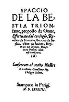 frontespizio 'Spaccio del la bestia trionfante' di Giordano Bruno, stampato in Parigi